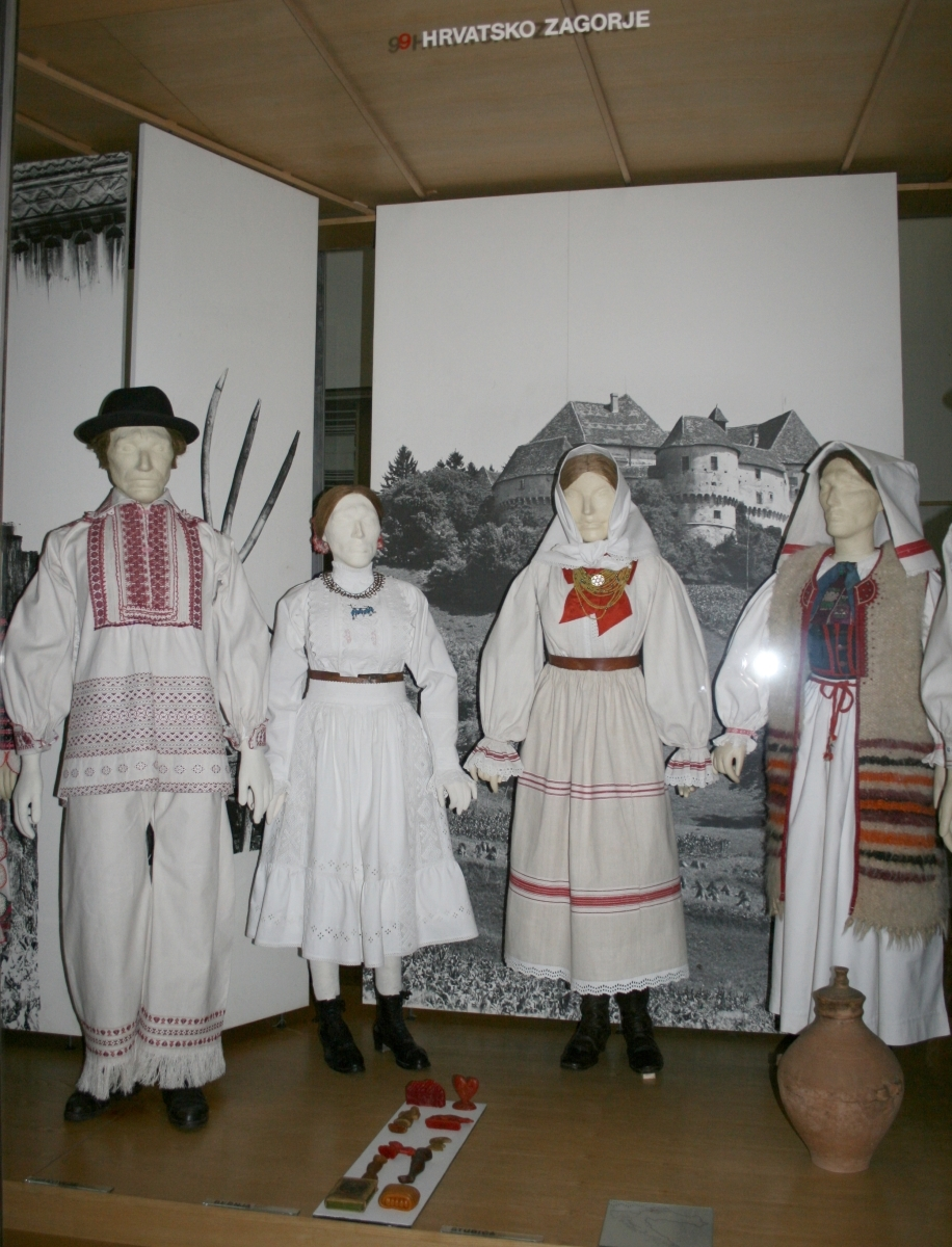 snimljeno tijekom Noći muzeja u Etnografskom muzeju u Zagrebu